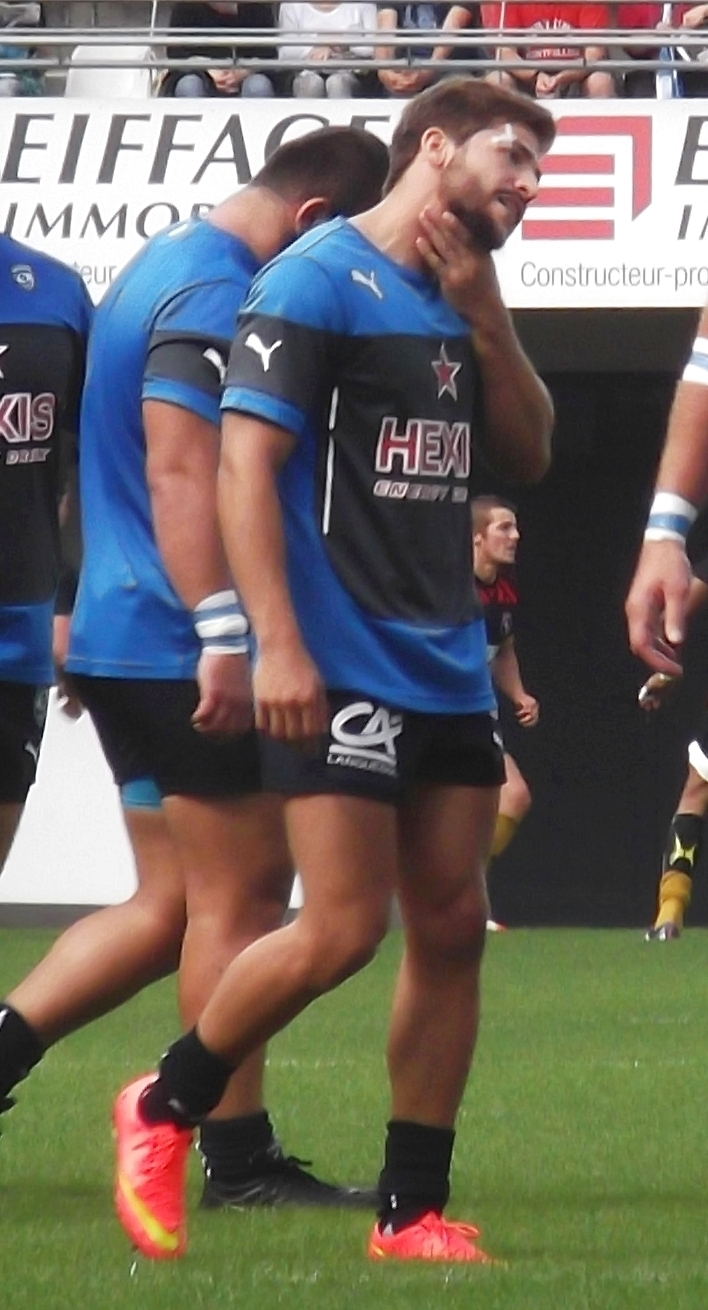 Teddy Iribaren, octobre 2014.